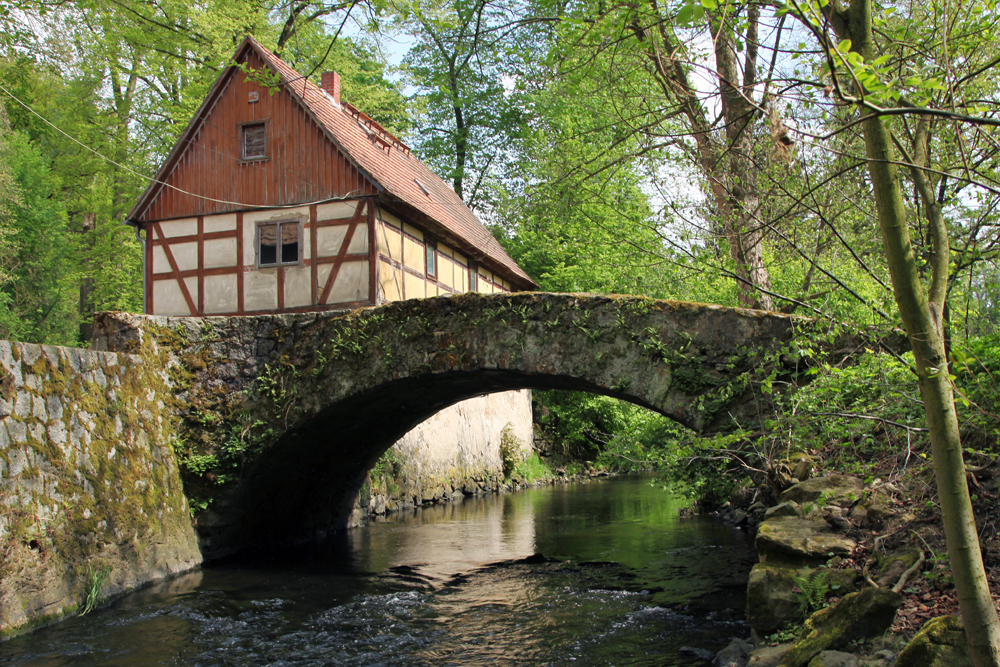 Brücke über die Große Röder an der Grundmühle in Liegau-Augustusbad